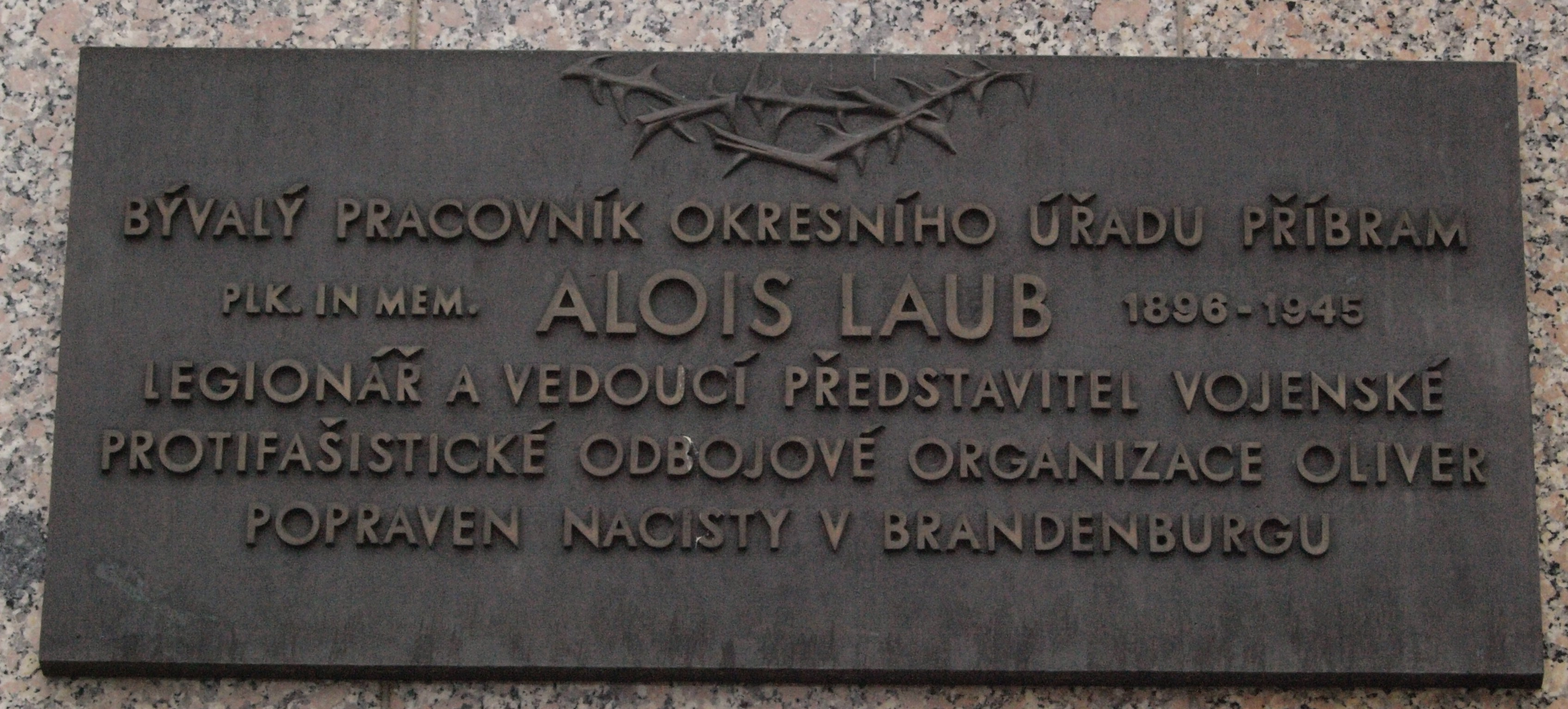 Česky: Pamětní deska věnovaná Aloisi Laubovi na náměstí T. G. Masaryka v Příbrami (dům č. 99)